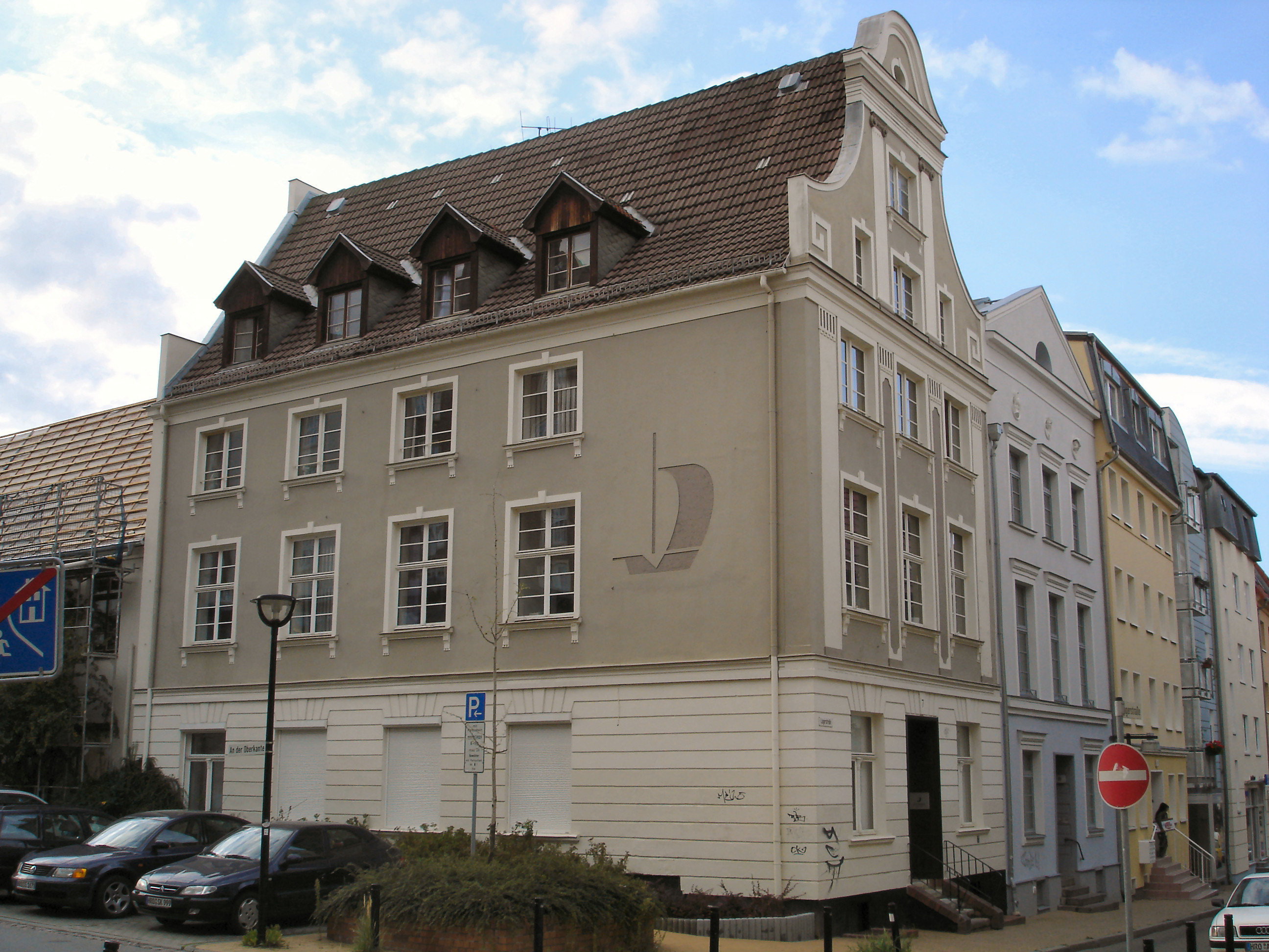 Gebäude des Hinstorff-Verlags in Rostock, Lagerstr. / Building of the Hinstorff-Verlag in Rostock, Lagerstr.